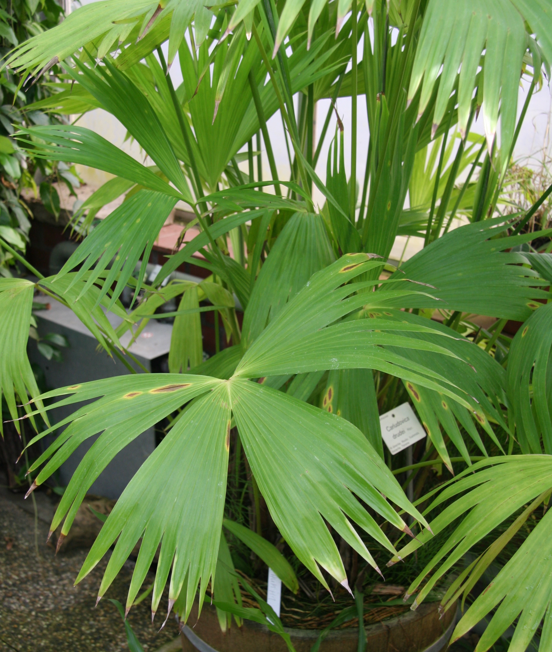 Carludovica drudei im Botanischen Garten Dresden